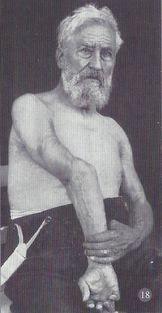 verdrehter Arm eines Mannes mit nicht verheilter Fraktur des Humerusschafts.